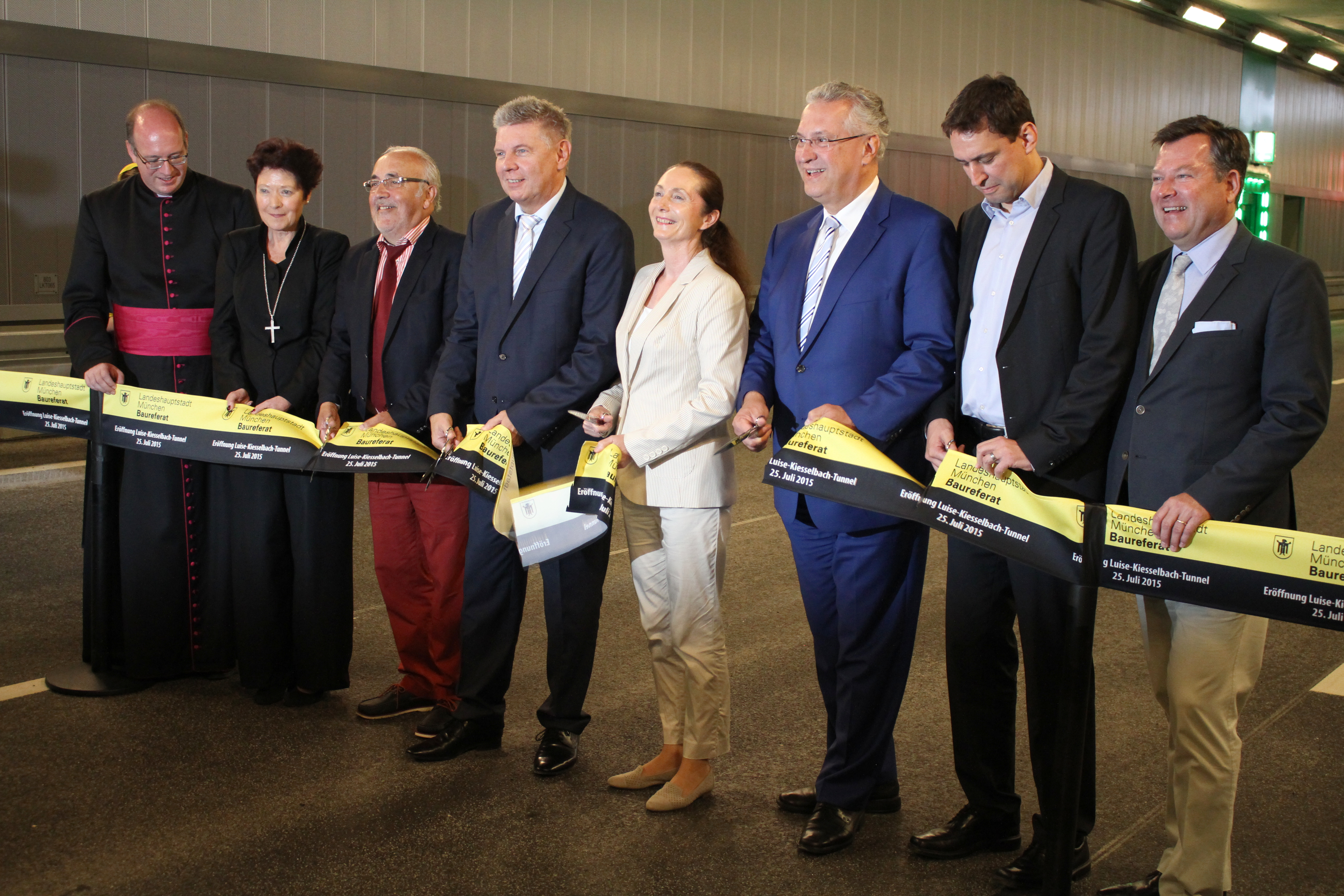 Luise-Kiesselbach-Tunnel des Mittleren Rings, Band zur Eröffnungsfeier. Teilnehmer von links: katholischer Bischofsvikar Rupert Graf zu Stolberg, evangelische Stadtdekanin Barbara Kittelberger, Bezirksausschußvorsitzender Günther Keller (SPD), Oberbürgermeister Dieter Reiter (SPD), Baustadträtin Rosemarie Hingerl (parteilos), Bay. Innenminister Joachim Herrmann (CSU), Bay. Landtagsabgeordnete und Staatssekretär Georg Eisenreich (CSU), Bügermeister Joseph Schmidt (CSU)